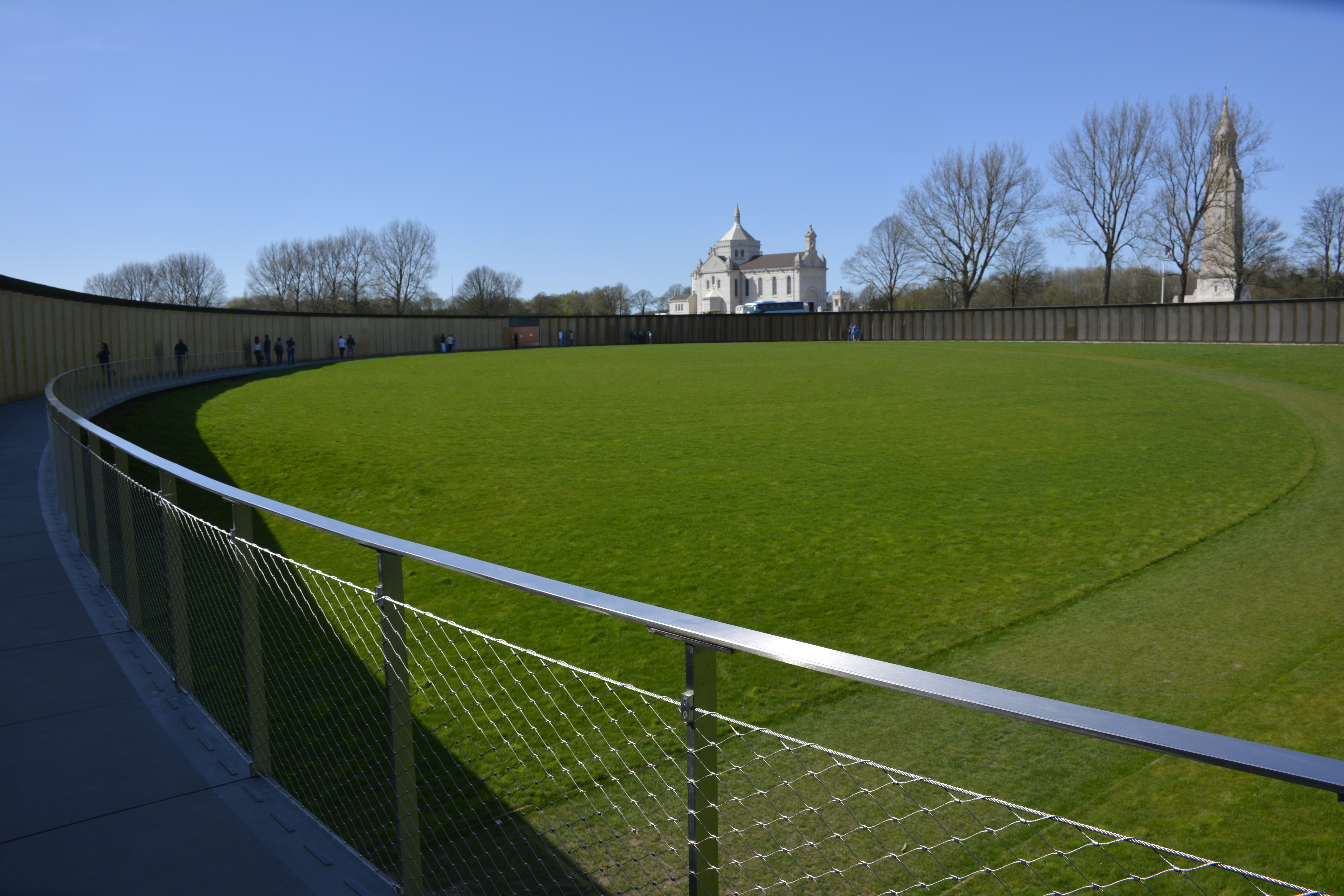 monument commémoratif, construit à côté de la Nécropole nationale de Notre-Dame-de-Lorette et reprenant les noms de près de 600 000 morts lors de la Grande Guerre, sur les collines de l'Artois.